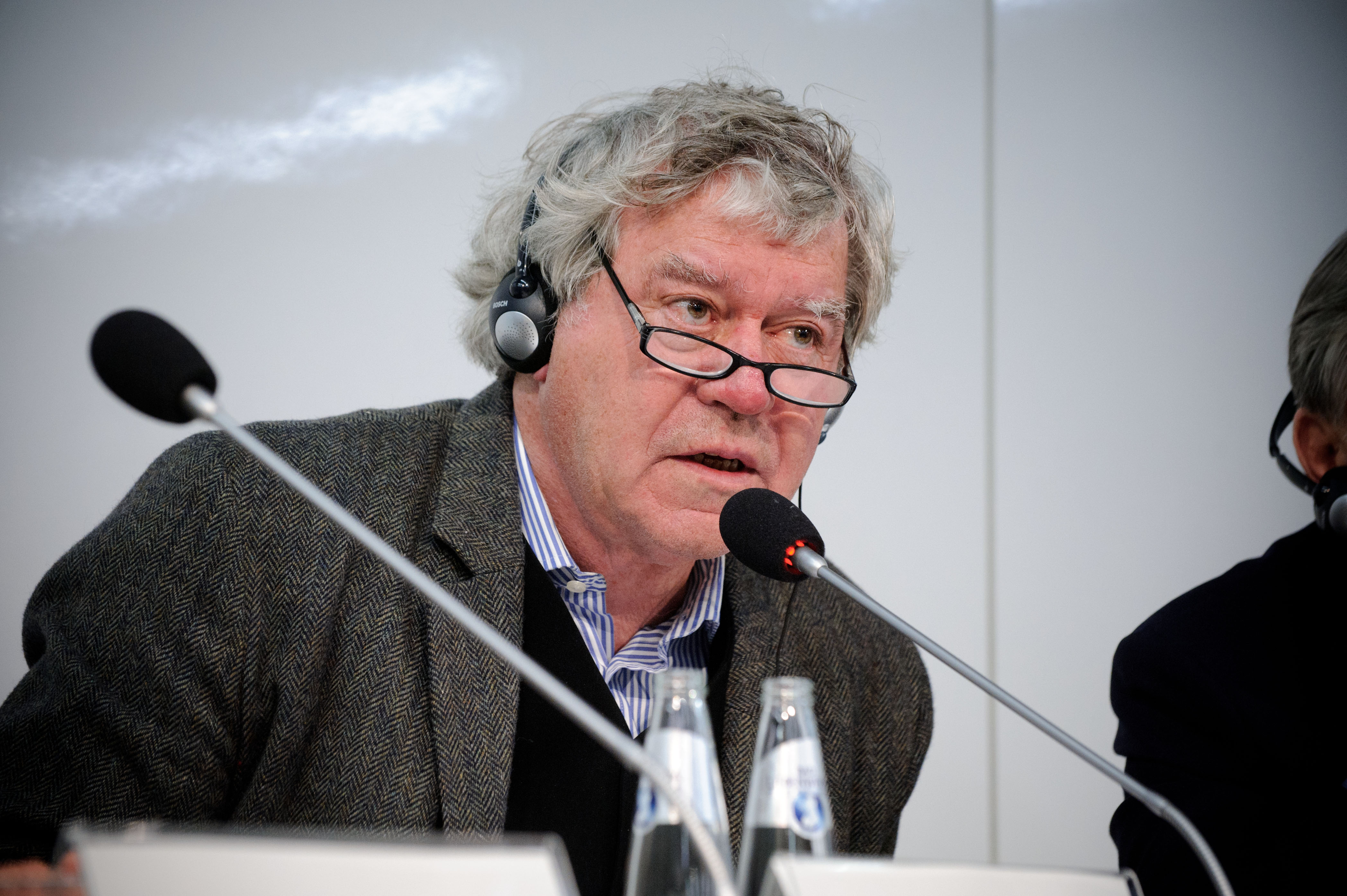 Tilman Spengler (Publizist, Autor, Sinologe) Diskussion: Die Geschichte der Anderen - Chinas Blick auf die deutsche Vergangenheit Foto: Stephan Röhl